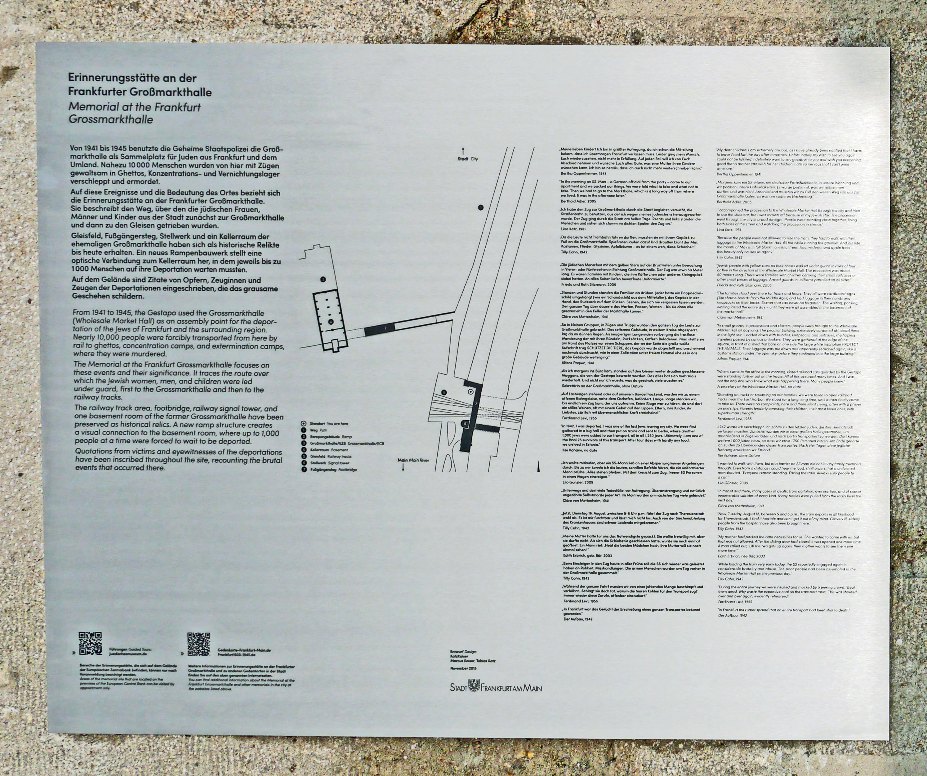 Infotafel zur Gedenkstätte der Deportationen jüdischer Menschen bei der Großßmarkthallein Frankfurt am Main.